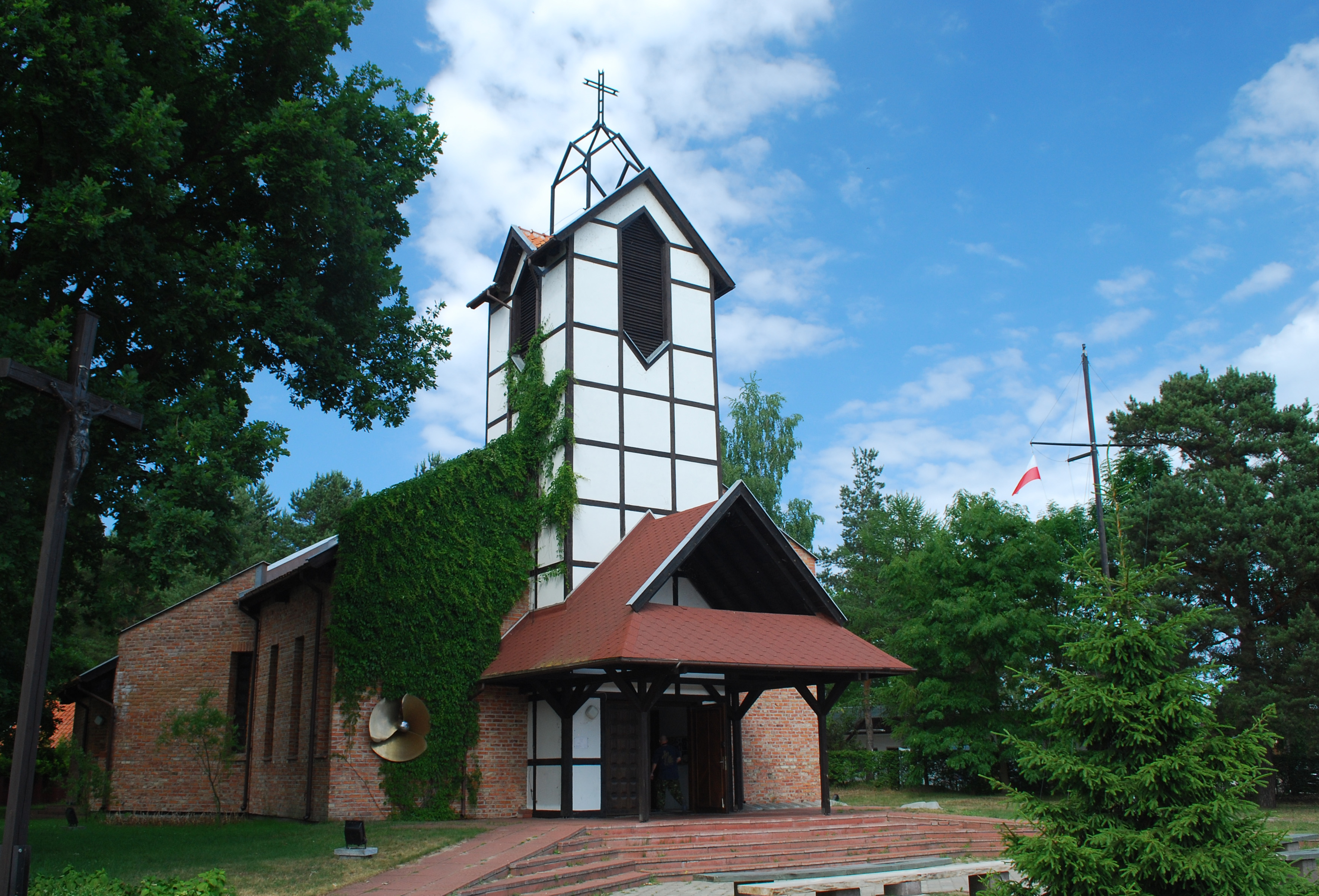 Kościół w Kątach Rybackich.